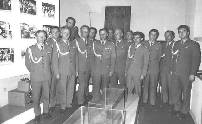 Przasnysz, 1975r. Kadra JW 4420 w sali tradycji